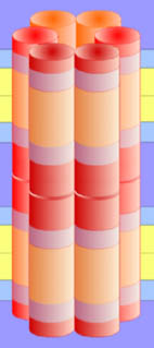 Connexon - vollständiger Kanal